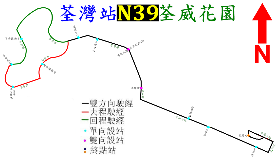 中文（香港）: 九巴通宵巴士N39線的走線圖